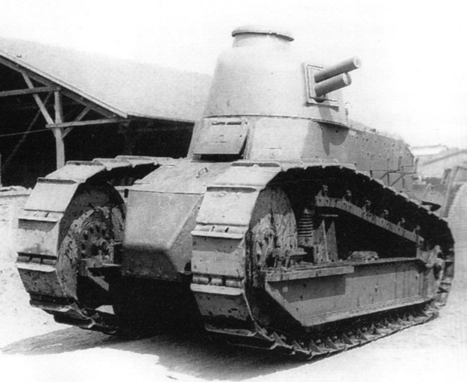 Digitale reproductie foto van het prototype van de FT-17 tank